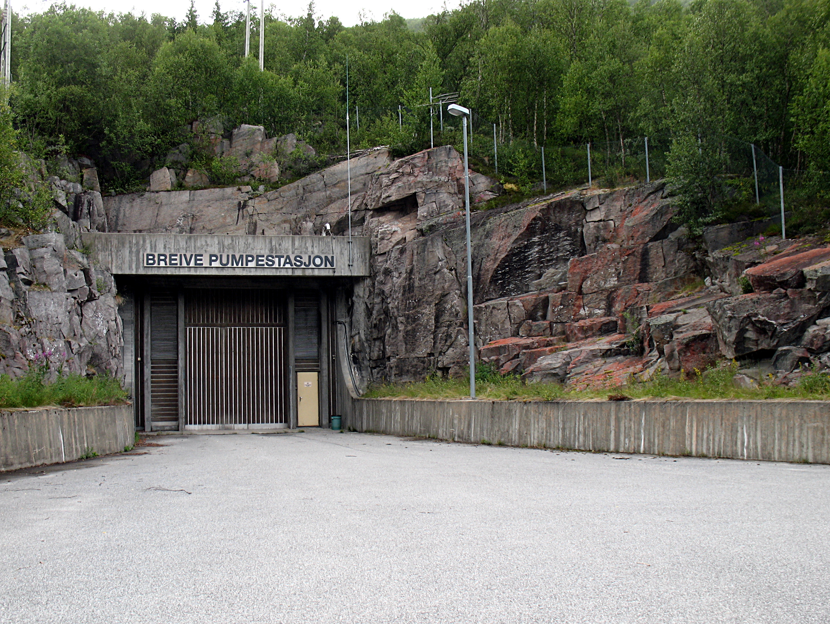 Breive pumpestasjon ved Breivatn på Hovden i Bykle kommune, Aust-Agder, har 8 pumper og pumper vatnet 90 meter opp. Den er ein del av Holen kraftstasjon.